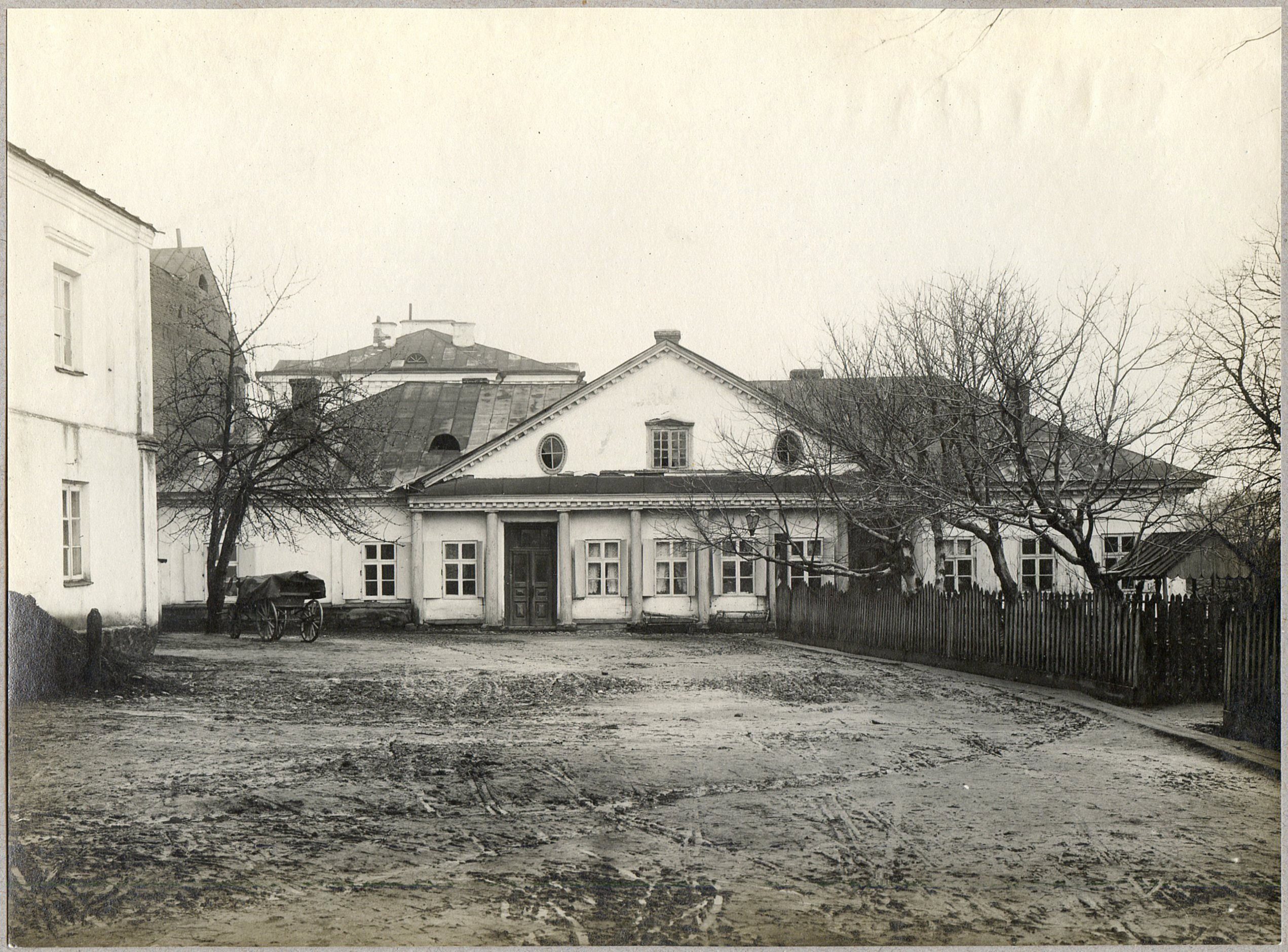 Беларуская (тарашкевіца): Менск (Miensk), Валокі Полацкія (Vałoki Połackija): вуліца Валоцкая (vulica Vałockaja), палац Ваньковічаў (Vańkovič)